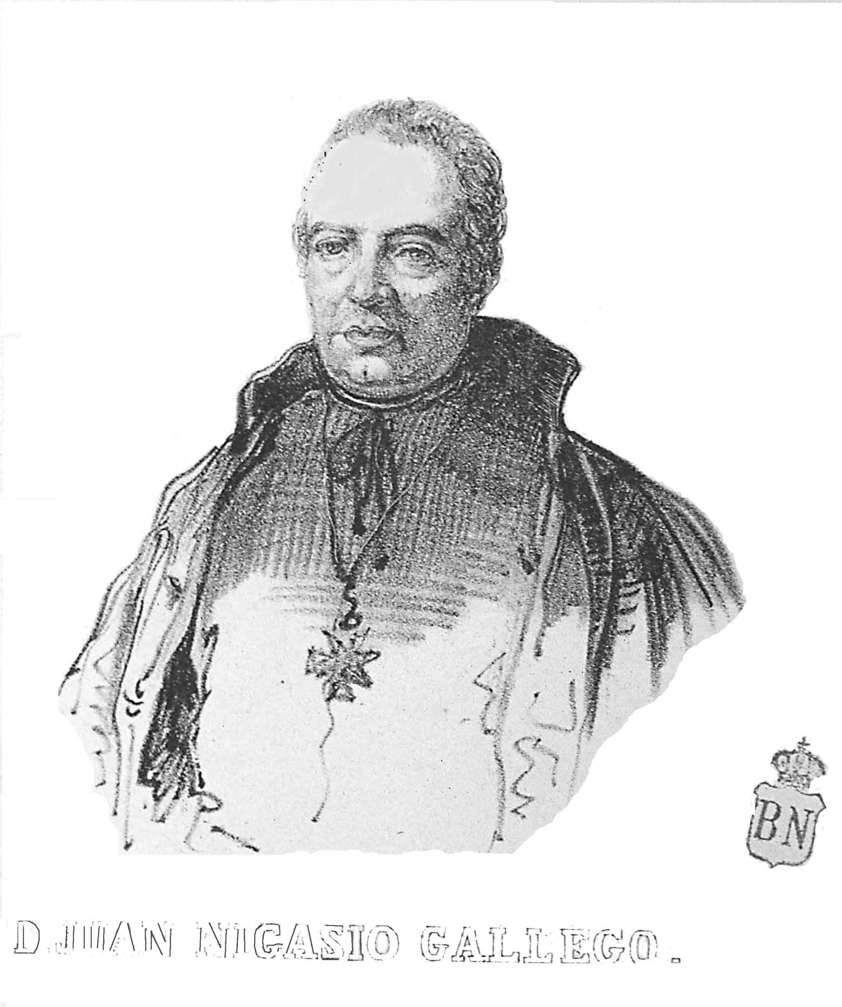 Retrato de Juan Nicasio Gallego